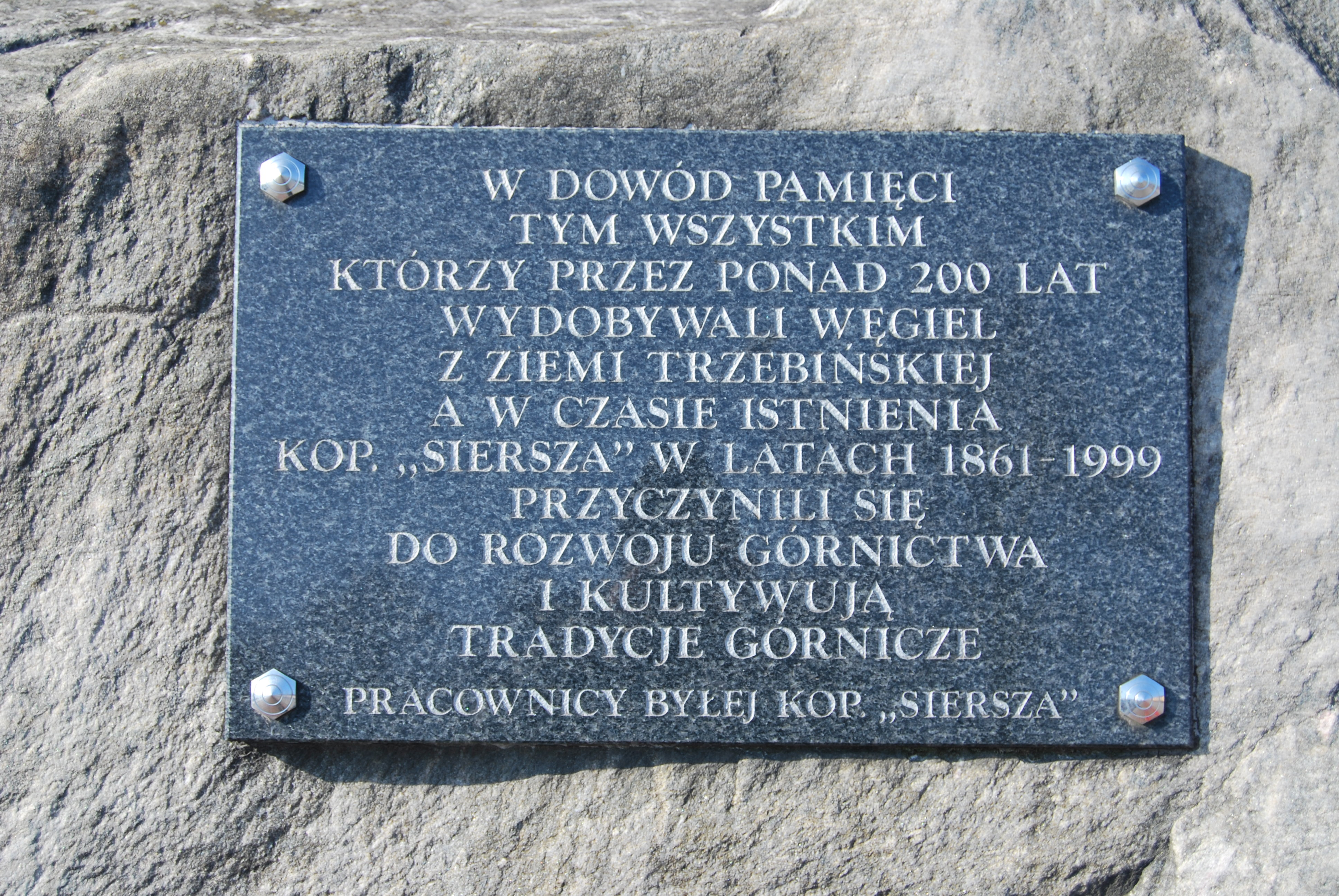 Tablica poświęcona pracownikom Kopalni "Siersza" przed budynkiem Muzeum Regionalnego w Trzebini (2015).